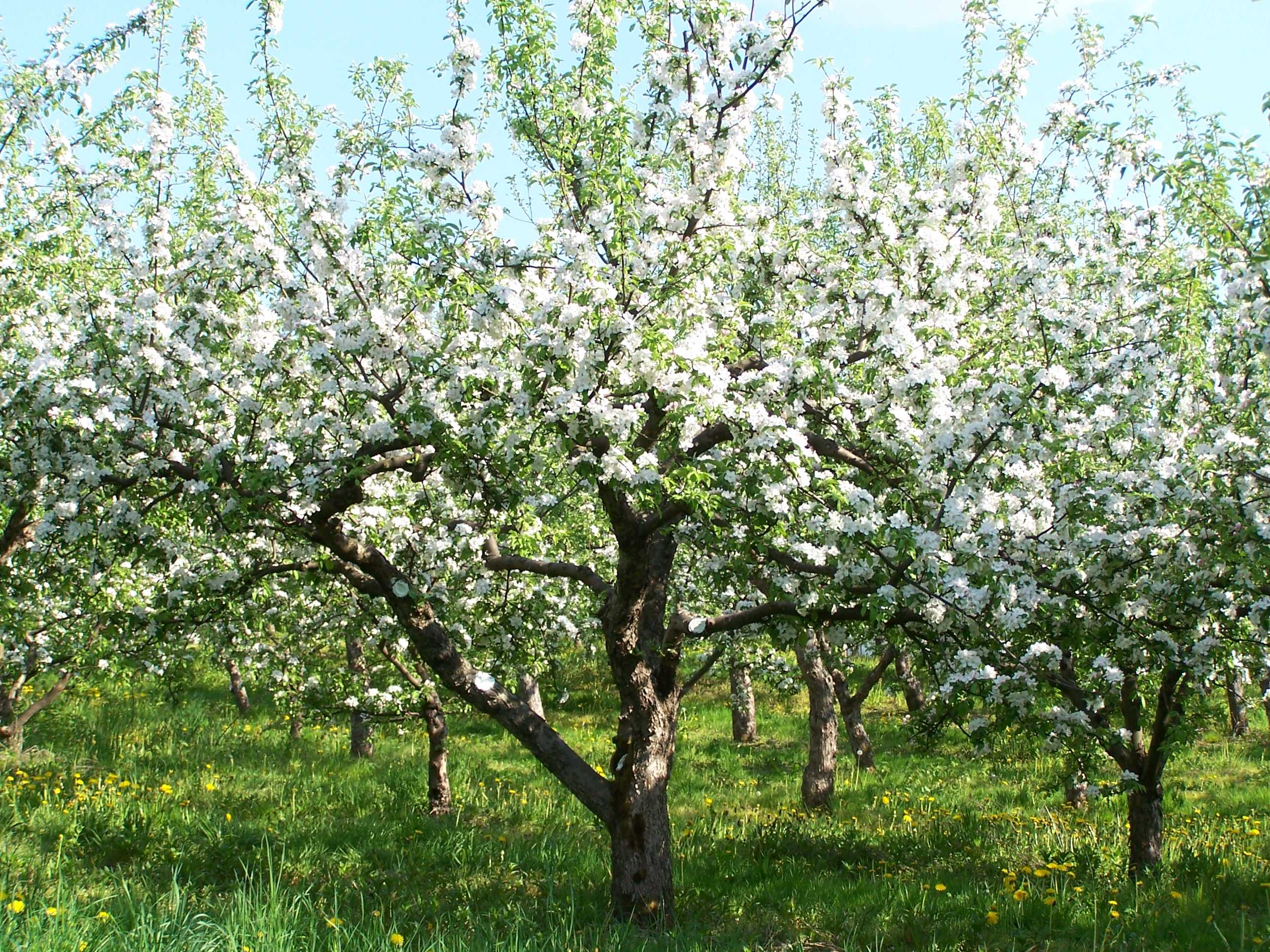 Jabłoń